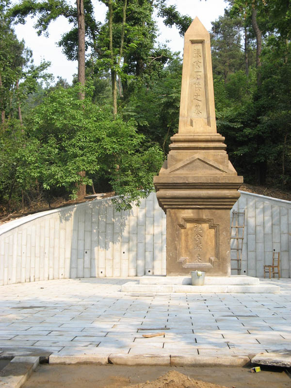 张辉瓒墓